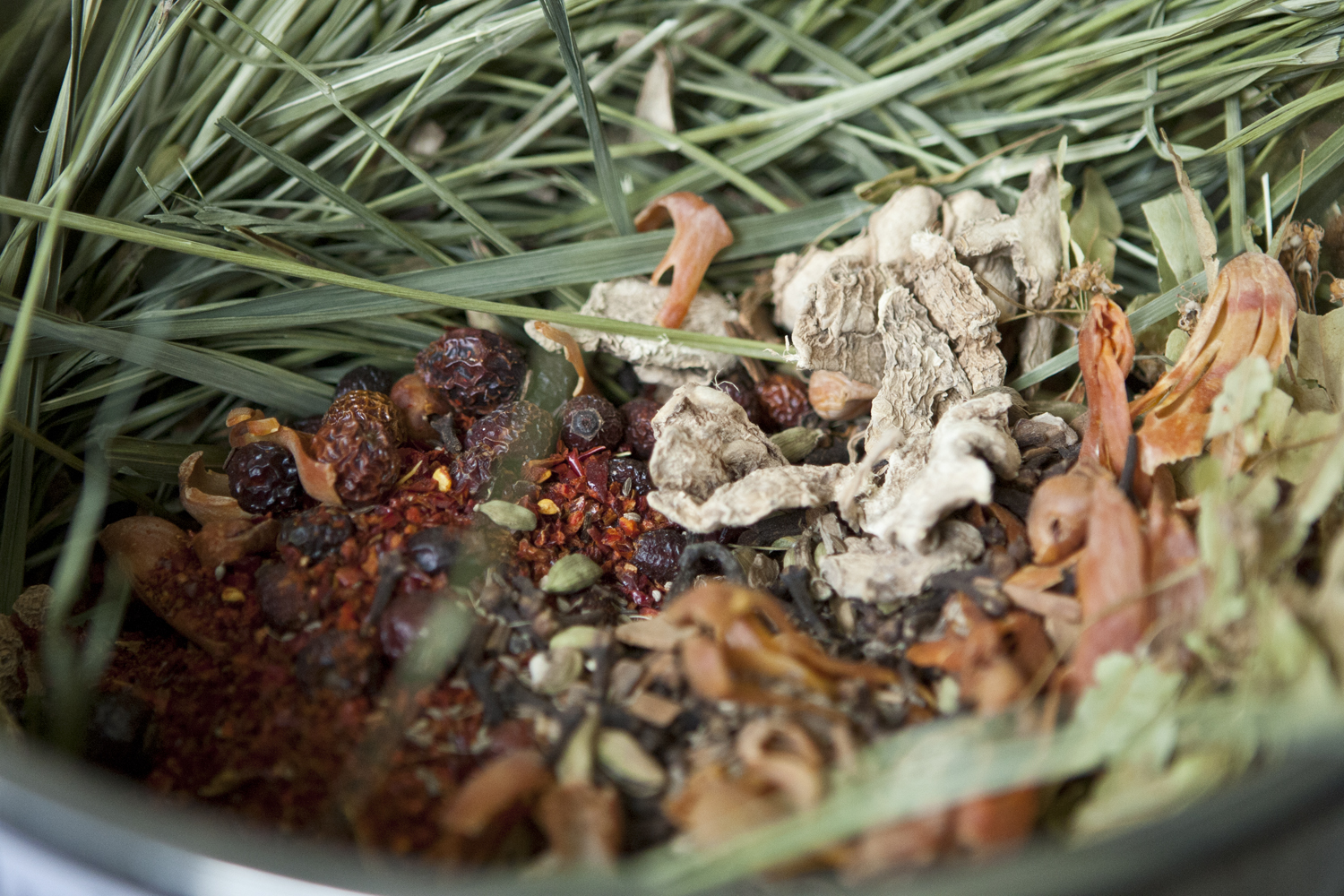 Ingredientai